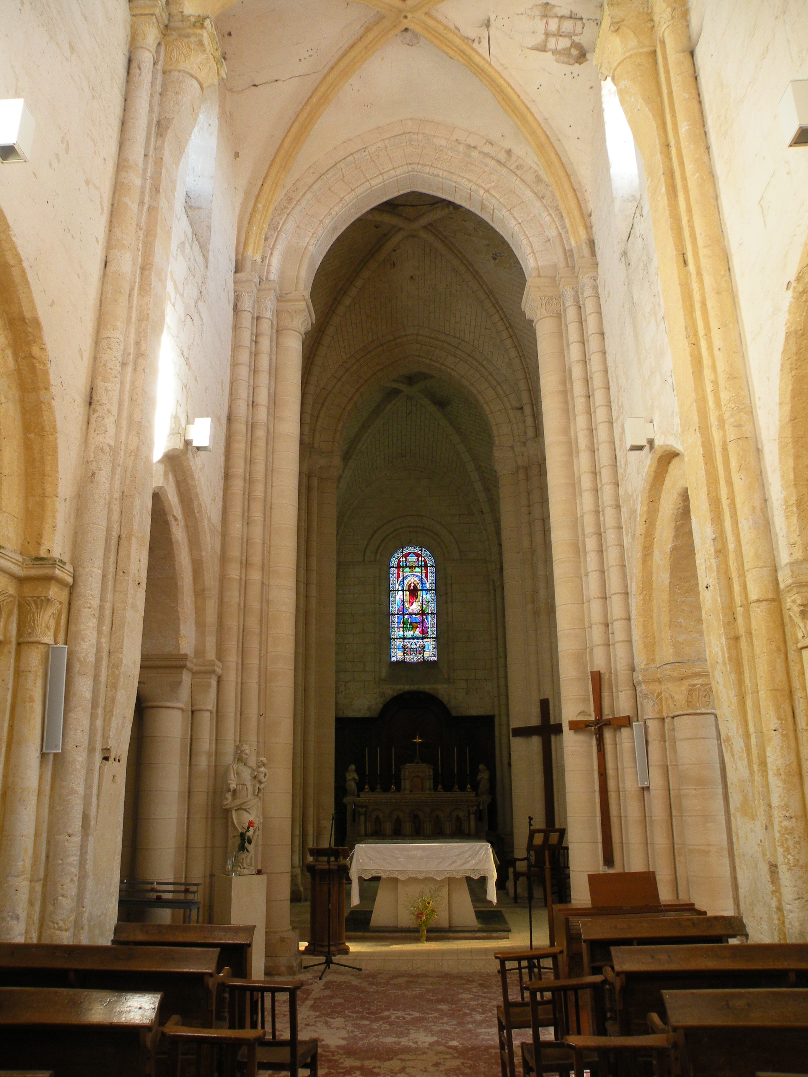 Église de la Nativité-de-Notre-Dame de Lavilletertre